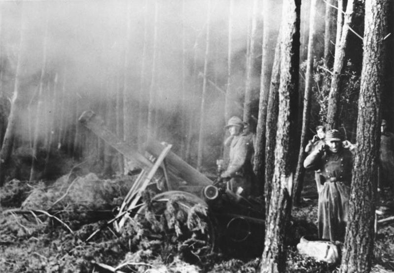 Hürtgenwald, schweres Infanteriegeschütz Scherl: Schwere Infanteriegeschütze im Wald von Hürtgen bei der Abwehr eines der zahllosen nordamerikanischen Angriffe PK-Kriegsberichter Jäger [Bei Düren, Wald von Hürtgenwald.- Schweres Infanteriegeschütz beim Feuern, Aufnahme am 22.11.1944]